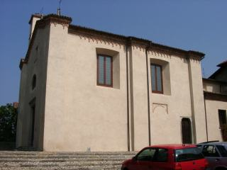 Chiesa di Santa Maria Assunta in Daverio, fatta erigere a inizio '400 dalla nobile famiglia Sessa su un preesistente edificio religioso.